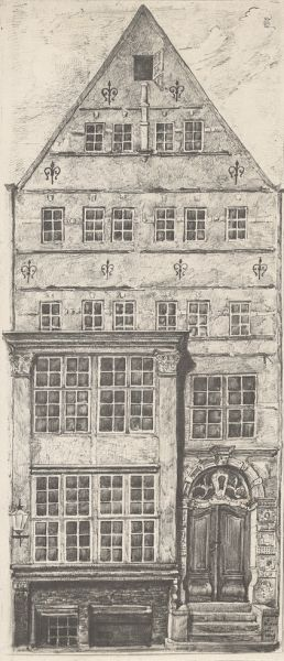 Zu sehen die Fassade der Gebäudes Katharinenstraße 9. Beschriftung "Catharinenstr. 9 / Haus v. 1630 / Federzeich. v. E. Niese / 1889".